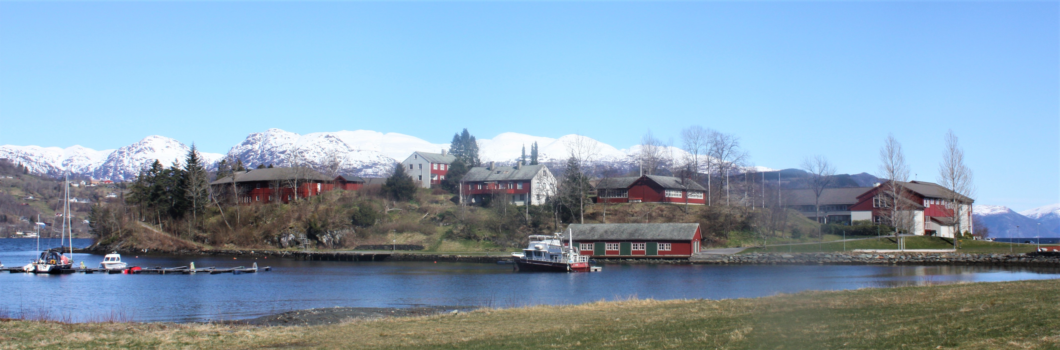 Framnes kristne vidaregåande skule i Norheimsund